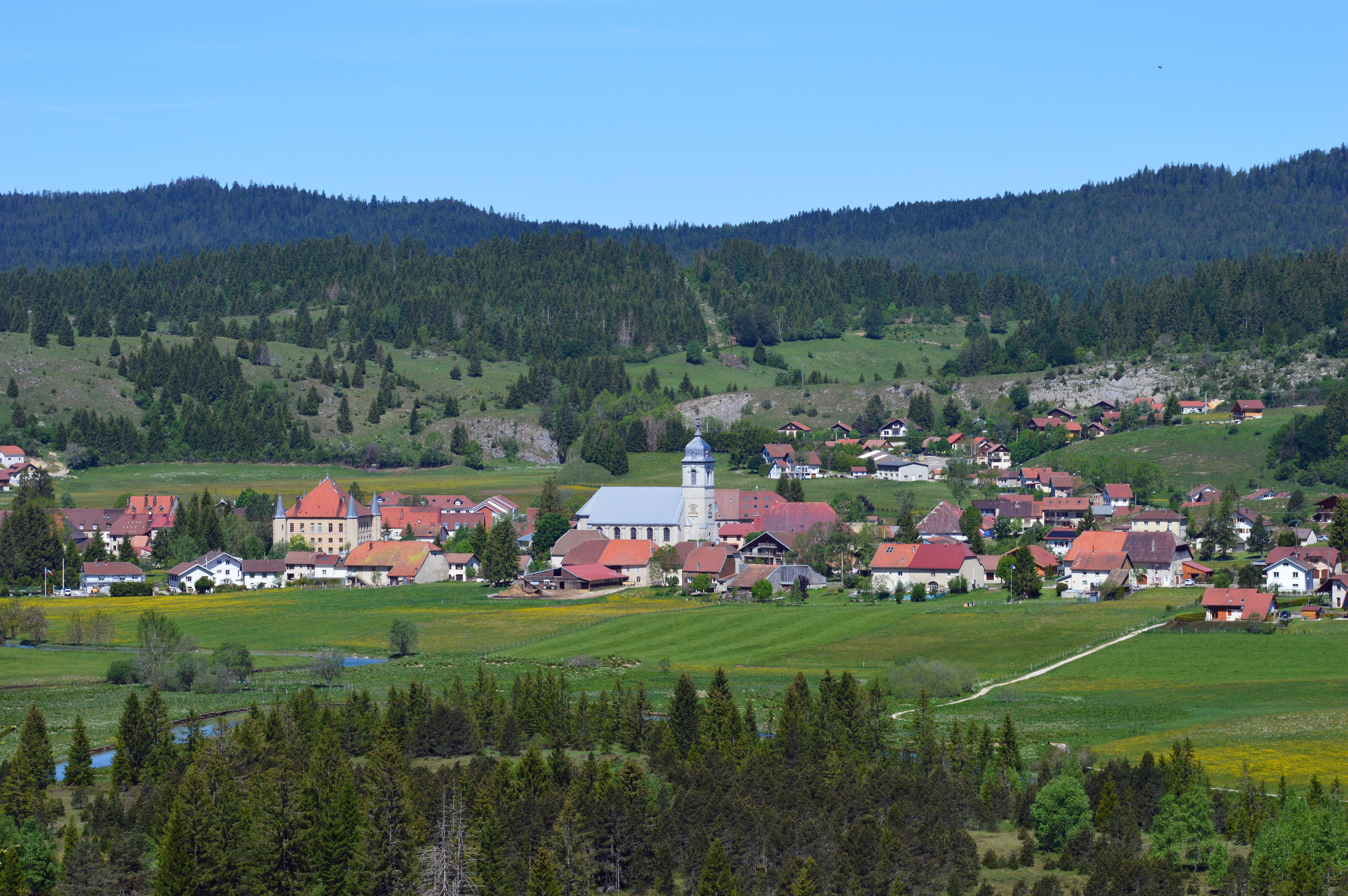 Vue sur le village de Mouthe, situé en France dans le département du Doubs et dans le Massif du Jura. Photographie prise en juin 2019 depuis le belvédère de la Source.